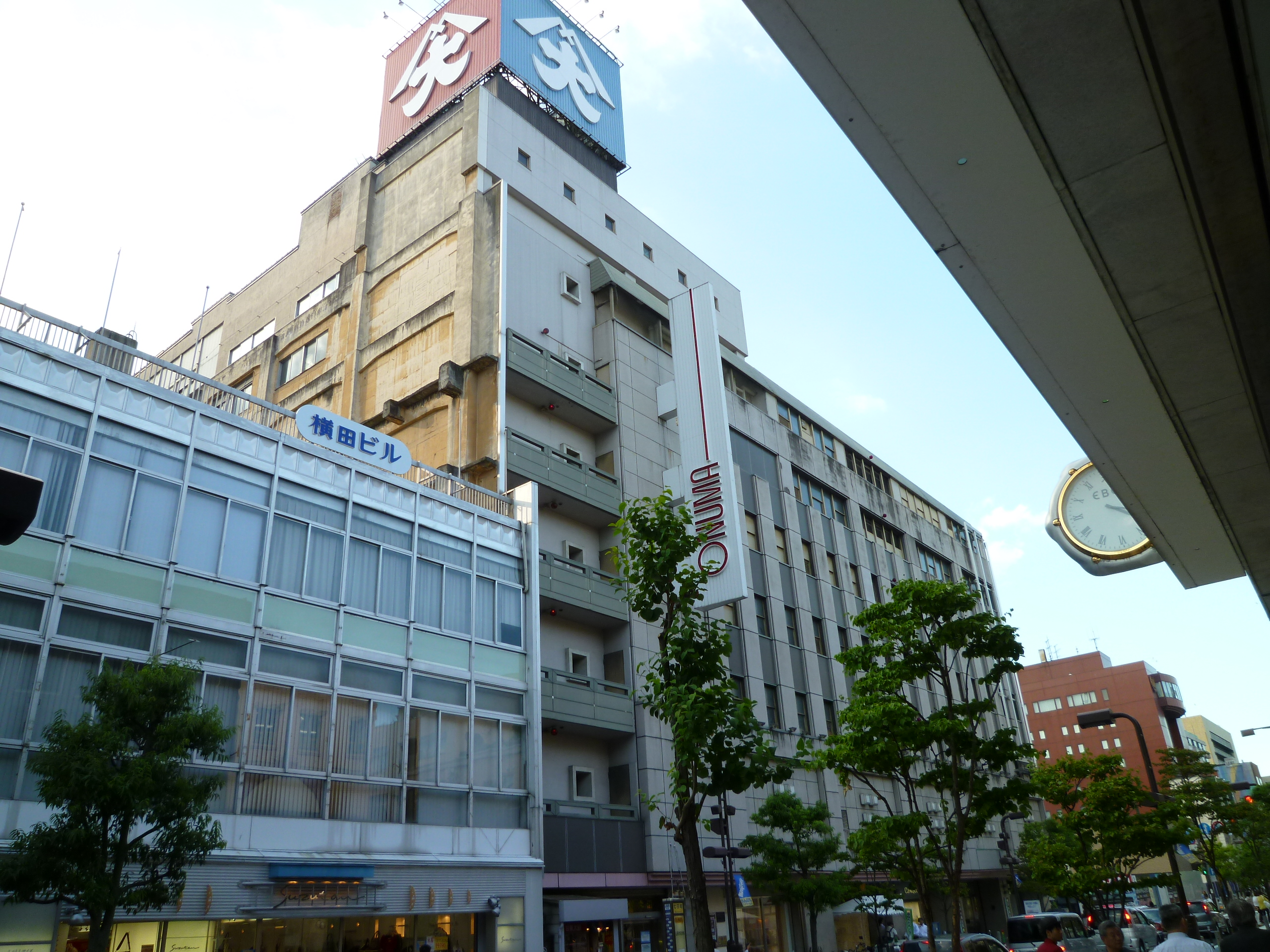 大沼デパート（山形市七日町）